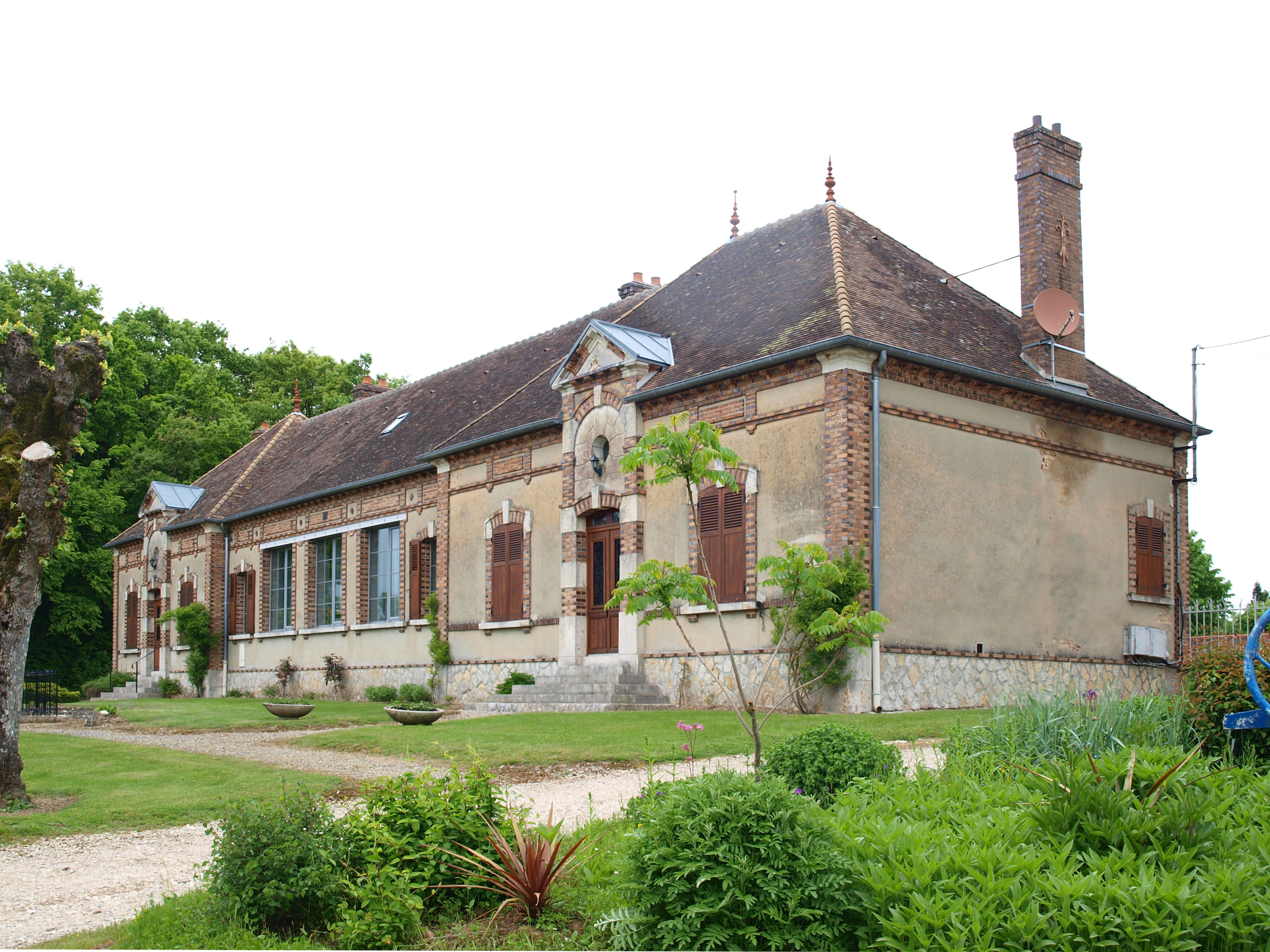 Chevry-sous-le-Bignon (Loiret, France) ; mairie